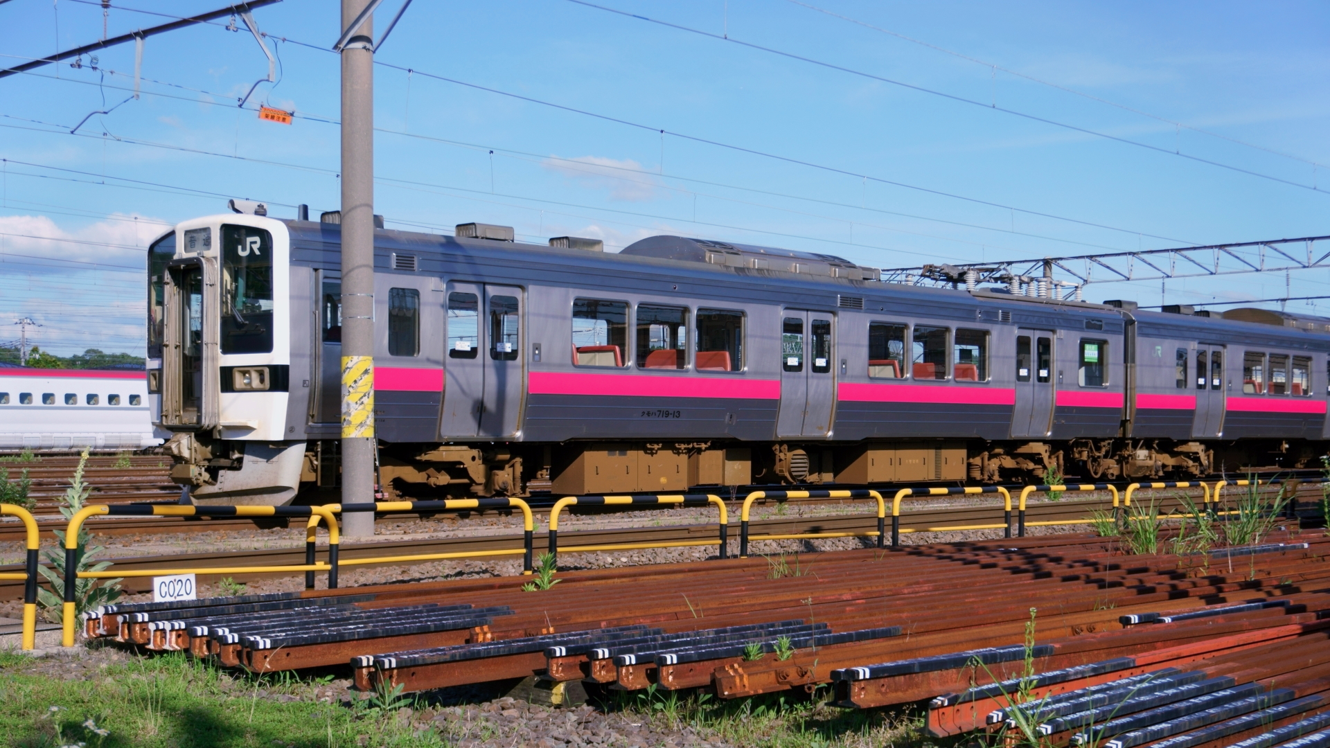 秋田車両センターに転属してきた719系H13編成。帯色は他の秋田地区所属701系に倣い濃いピンクとなったが、前頭部は黒のままである。